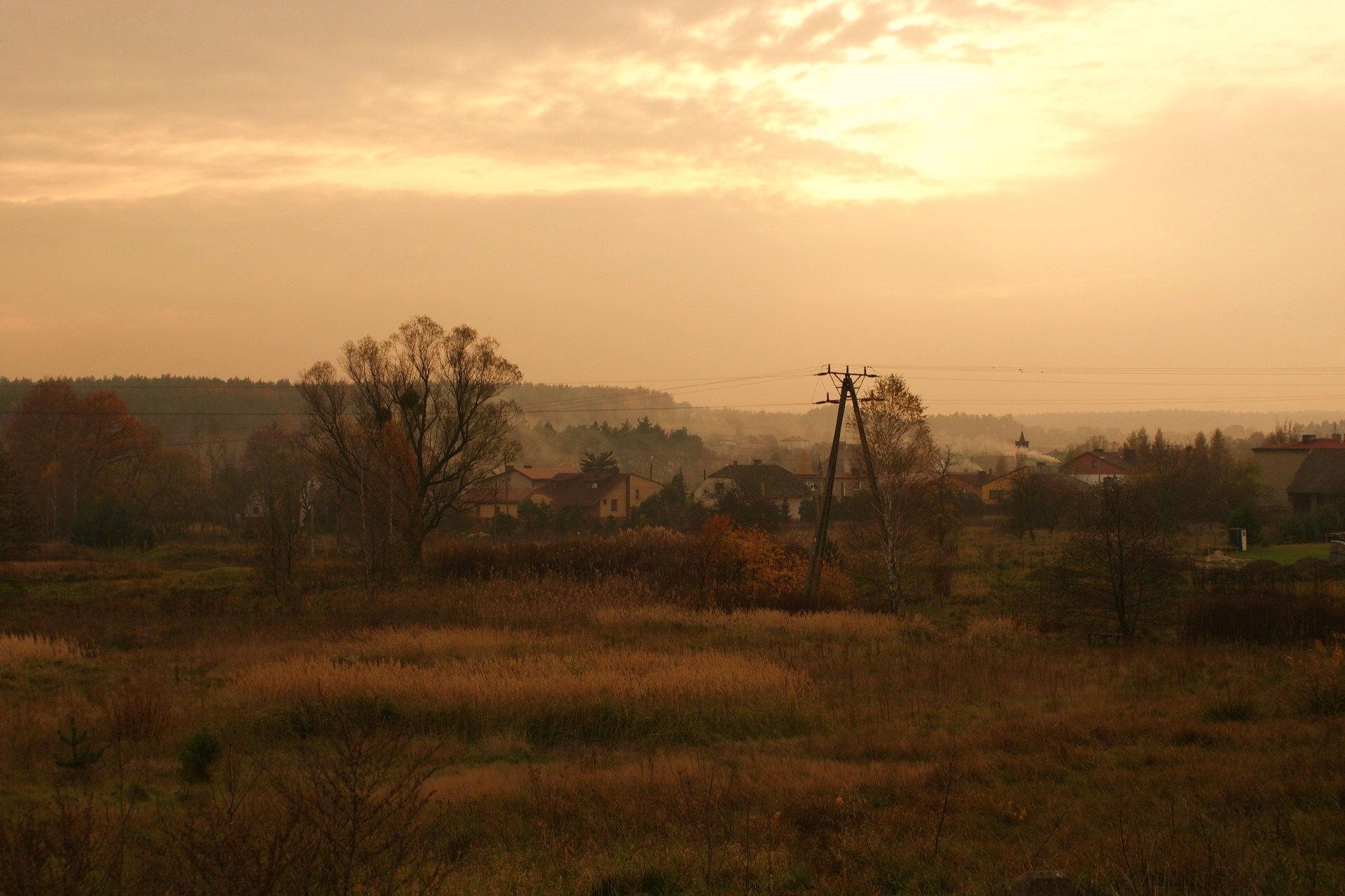 Pejzaż Górek Śląskich